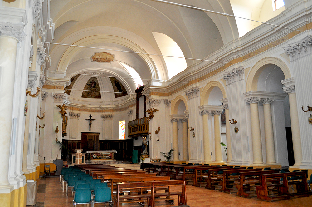 Cattedrale di Santa Maria Assunta (Duomo) This is a photo of a monument which is part of cultural heritage of Italy.